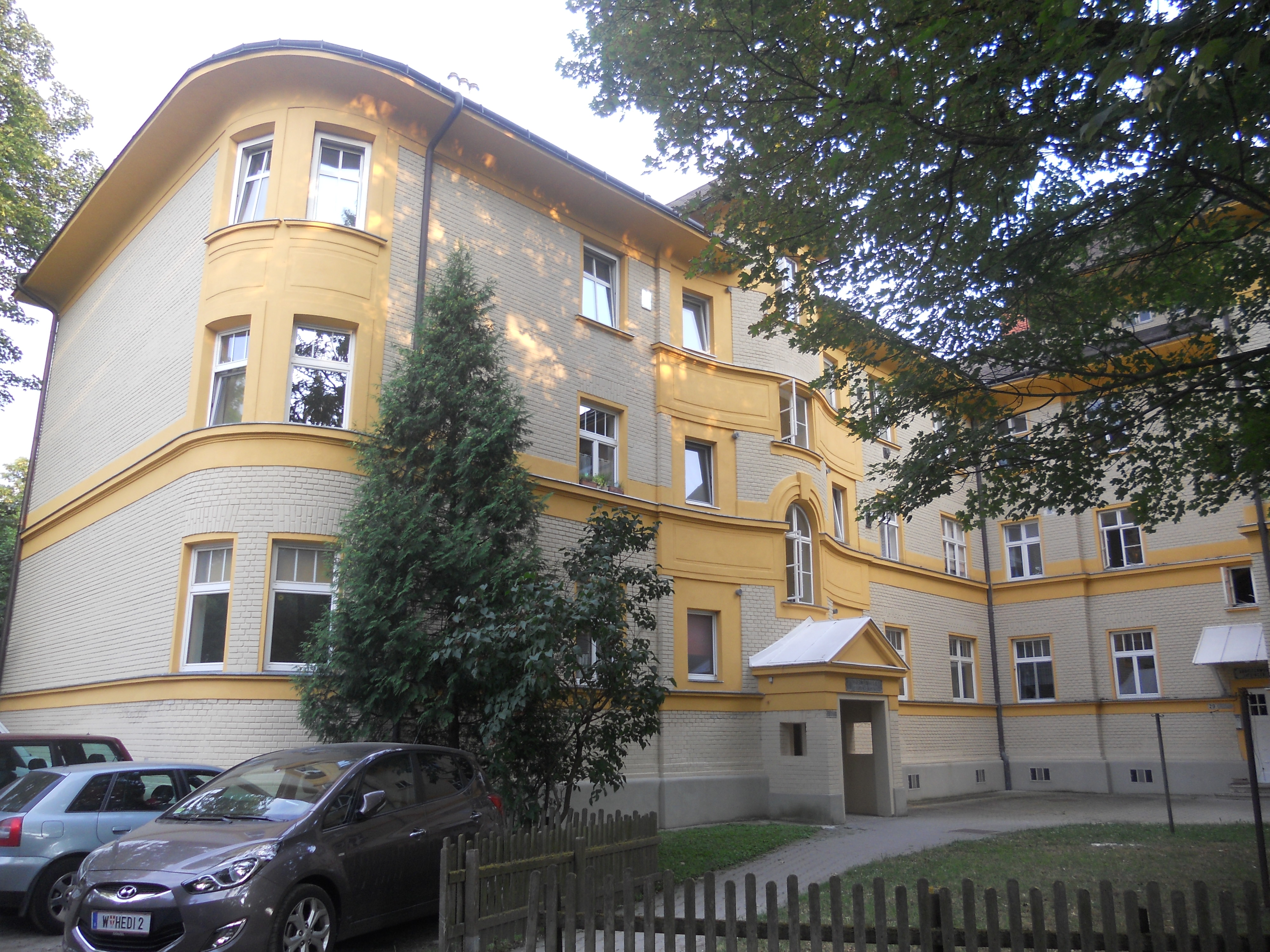 Arbeiterwohnhaus der Liesinger Brauerei, Lehmanngasse 29